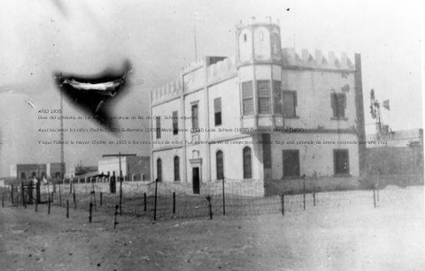 Esta es la casa, llamada del gobierno, en la que vivíó y tuvo su despacho el gobernador español de La Agüera, antiguo Sahara español, el capitán de Infantería Francisco Pérez Pérez, desde 1.928 hasta 1.935 En ella nacieron cinco de sus hijos con la ayuda del médico militar. Y en ella falleció la mayor, Cholita, de tos-ferina, a la edad de cinco años. Los saharauis de La Agüera así como los saharauis de los poblados más o menos cercanos, pasaron por esta casa a visitar a los padres y acompañaron a la niña fallecida hasta el cementerio cercano en el que fue enterrada bajo una pirámide de arena coronada por una cruz.